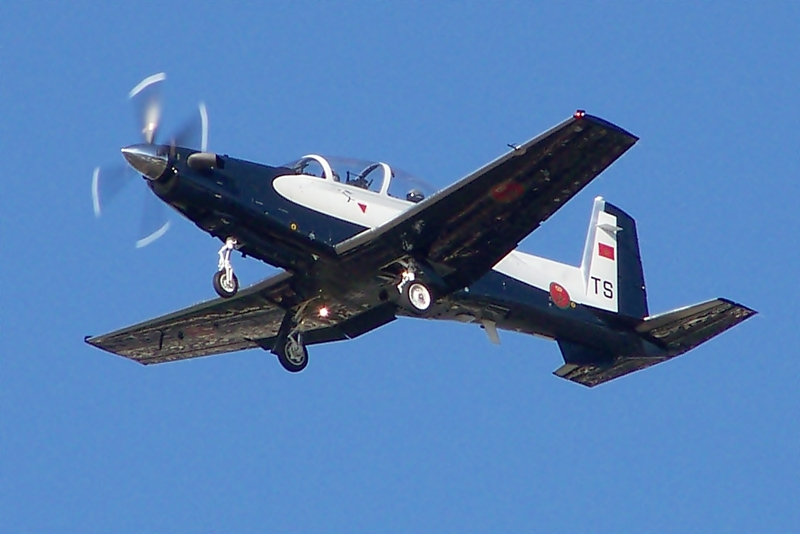 T-6 Texan CN-BTS landing Glasgow